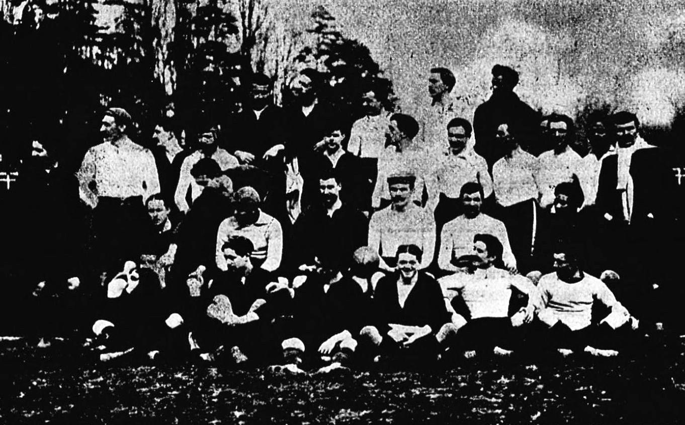 Finale du championnat de France de rugby en mars 1904, joueurs du Stade bordelais en blanc, et du Stade français en foncé.